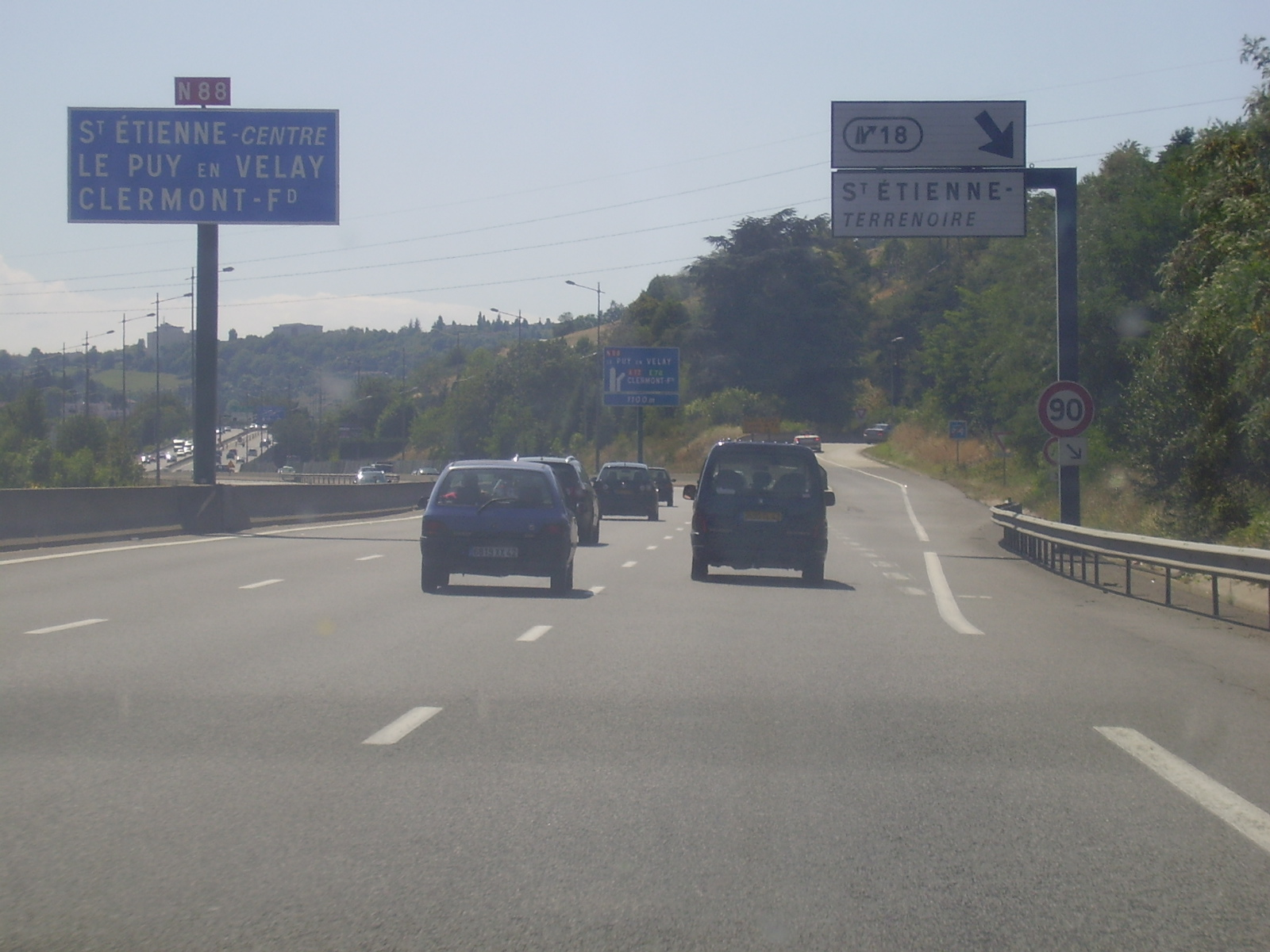 N88 vers Saint-Étienne, au niveau de la sortie 18 (Terrenoire)